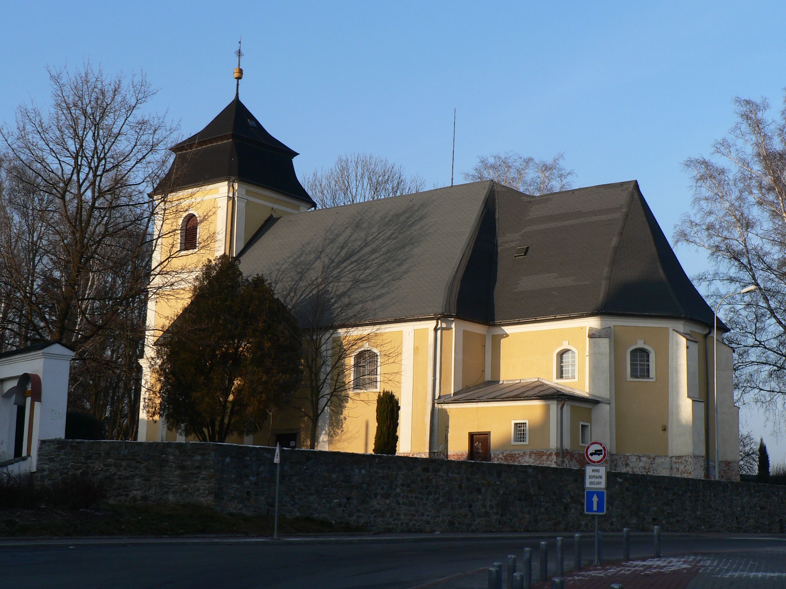 Kostel svaté Barbory (Zábřeh)